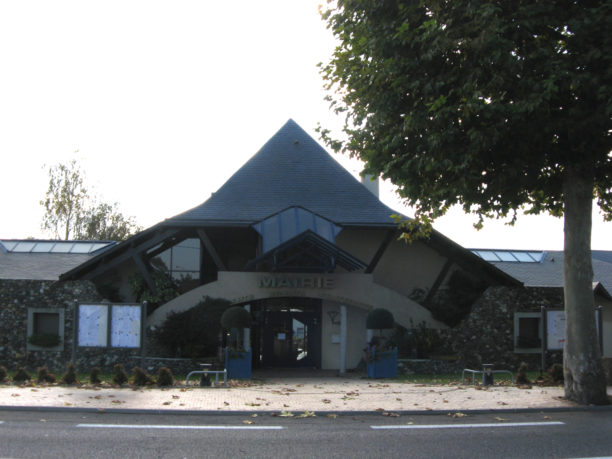 Mairie de Lacq depuis la route nationale (Pyrénées Atlantiques) Pyrénées).